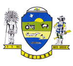 Brasão_Luciara_MT.gif